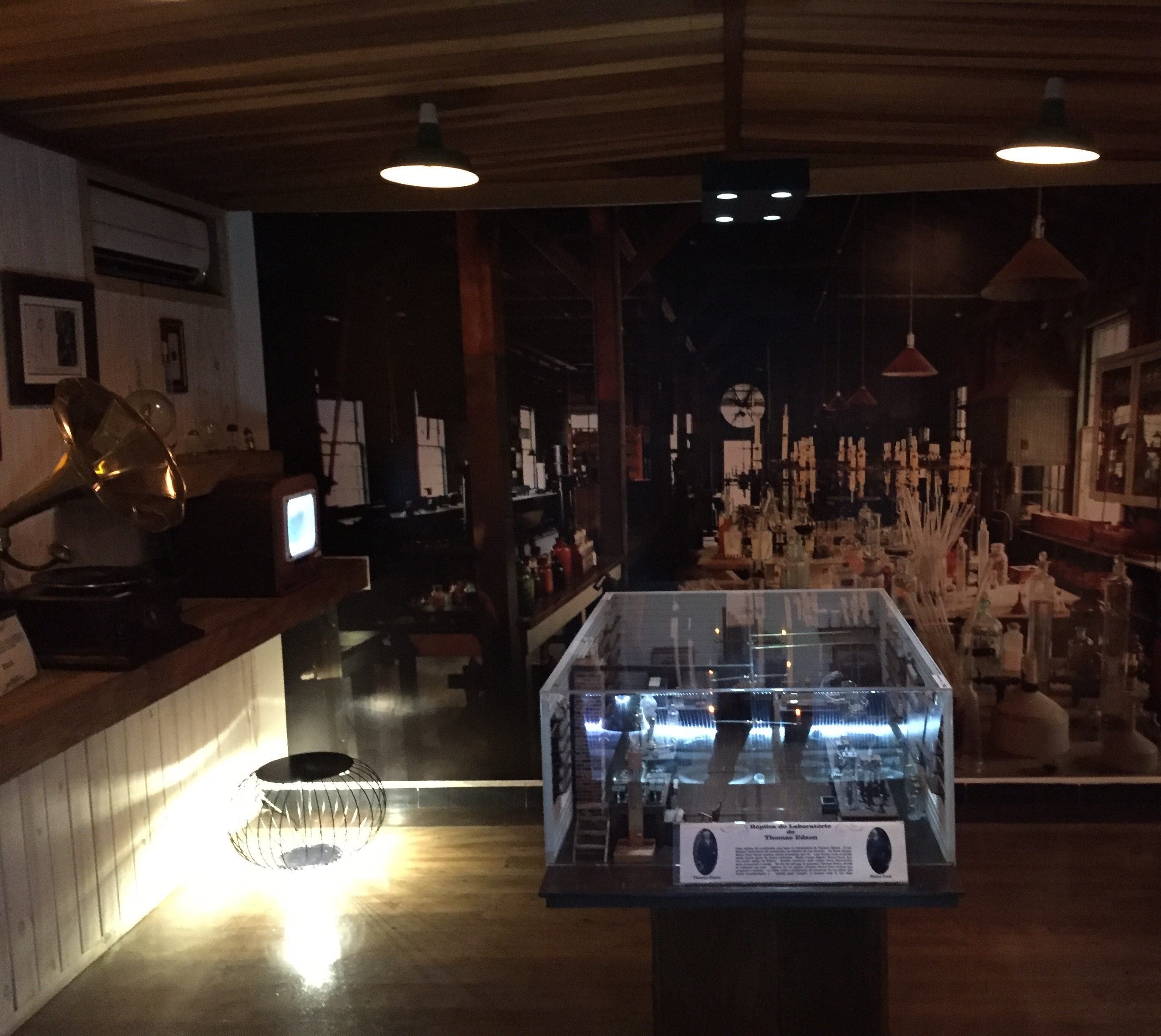 Primeira sala do museu, que contempla características retrogradas (rusticas), e tende a passar exposições baseadas nos primórdios do desenvolvimento e das descobertas da iluminação.